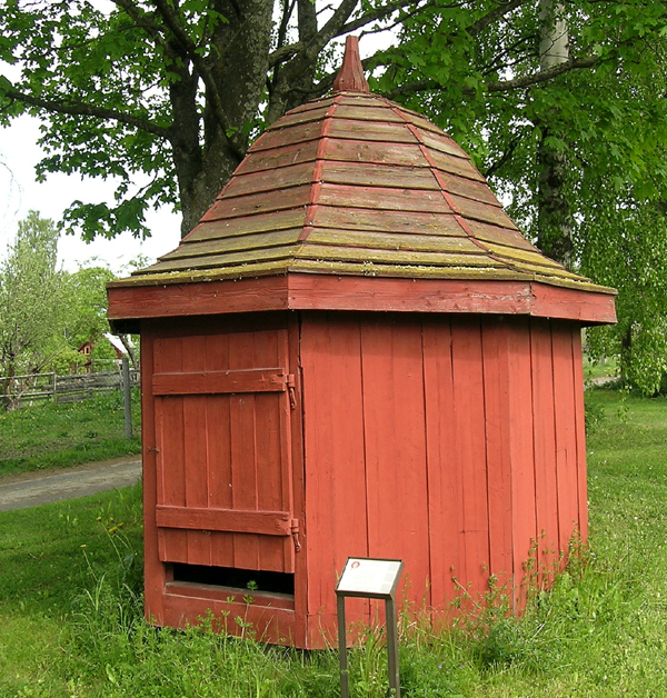 Brønnhus fra Ringsaker prestegard. Bygd første halvdel av 1800-tallet. I dag på Hedmarksmuseet, Hamar.